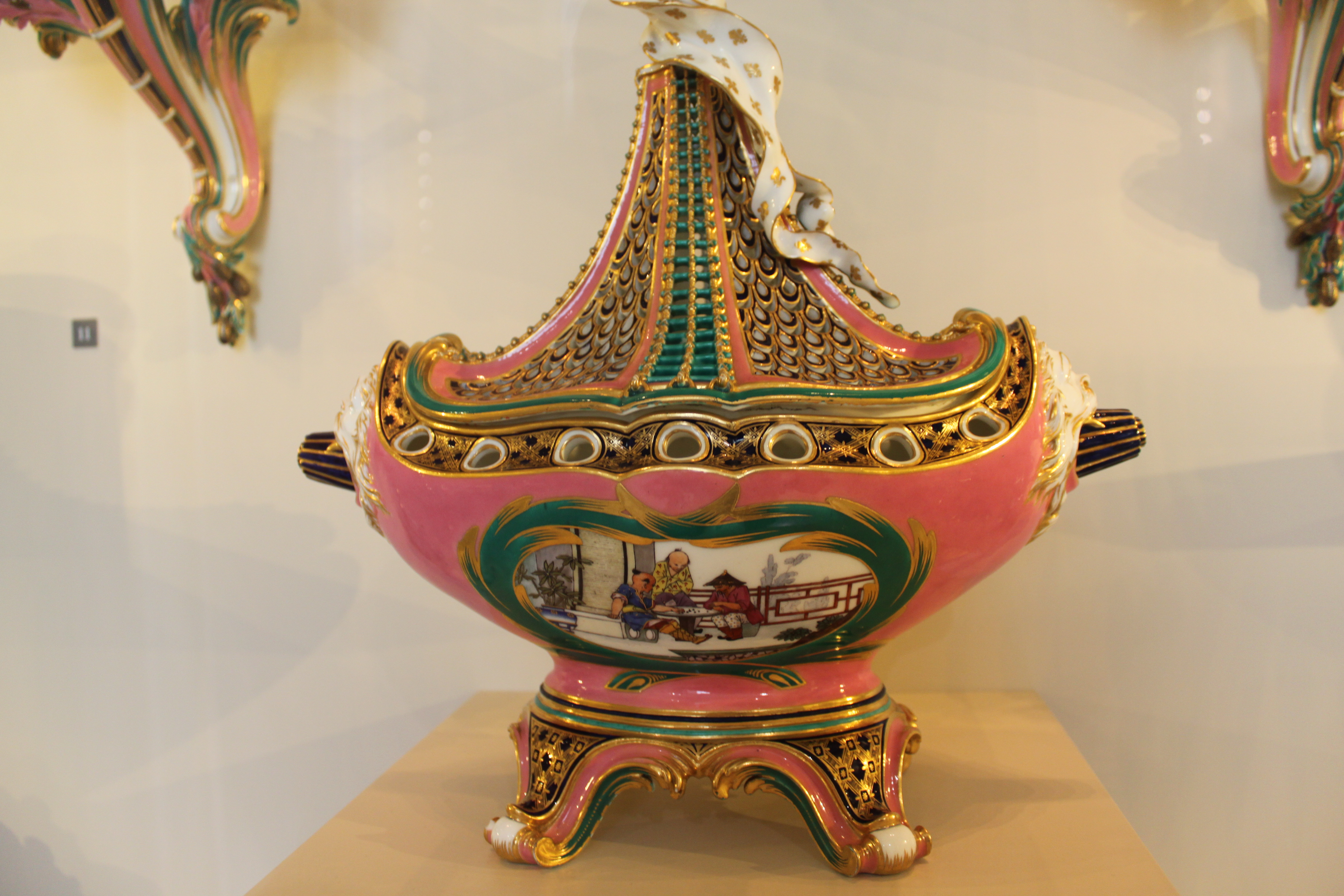 Pot-pourri "en vaisseau" ou "en navire" - en troisième grandeur - 1760 - Manufacture de Sèvres - Louvre - OA 10965 - Porcelaine tendre, bronze doré - Charles-Nicolas Dodin, peintre - D'après les modèles de Jean. -Claude Duplessis Il s'agissait de l'élément central d'un ensemble de 5 vases où on retrouve une paire de pots-pourris "fontaine' ou "à dauphins", (aujourd'hui au Paul Getty Museum), avec pour caractéristique une garniture à fond rose, vert et bleu lapis et à décor chinois. Le même style se retrouve sur une paire de bras de lumière au Louvre (OA 11027-11028), de même origine. Tout cet ensemble appartenait à Madame de Pompadour et était disposé à l'hôtel d'Evreux à Paris. Neuf autres exemples de pots-pourris "à vaisseau" sont actuellement répertoriés dans les Collections Royales anglaises, la Wallace Collection de Londres, Waddesdon Manor, la Frick Collection de New York, Sèvres Porcelain Manufactory - la Walters Art Gallery de Baltimore et le J.-P.Getty Museum de Malibu. On peut voir aussi l'article "Sèvres pot-pourri vase in the shape of a ship" sur wikipedia en anglais.